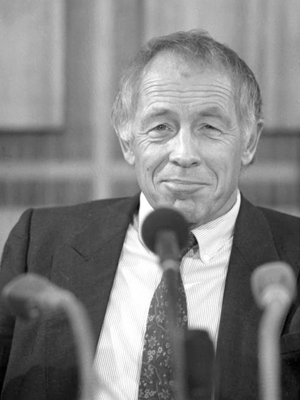 12.2.1987 Pressekonferenz der Generalsekretäre der CDU, Dr. Heiner Geißler, und FDP, Dr. Helmut Hausmann, sowie des Vorsitzenden der CSU-Landesgruppe im Deutschen Bundestag, Dr. Theodor Waigel, zu den Ergebnissen der zweiten Runde der Koalitionsverhandlungen (Wirtschafts- und Finanzpolitik, Sozial- und Familienpolitik) - im Saal der Bundespressekonferenz